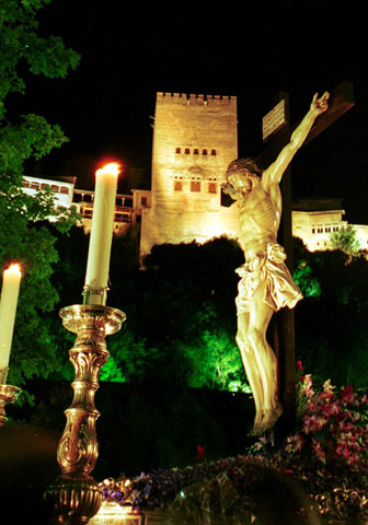 El Cristo del Consuelo (de los Gitanos) bajo las torres de la Alhambra